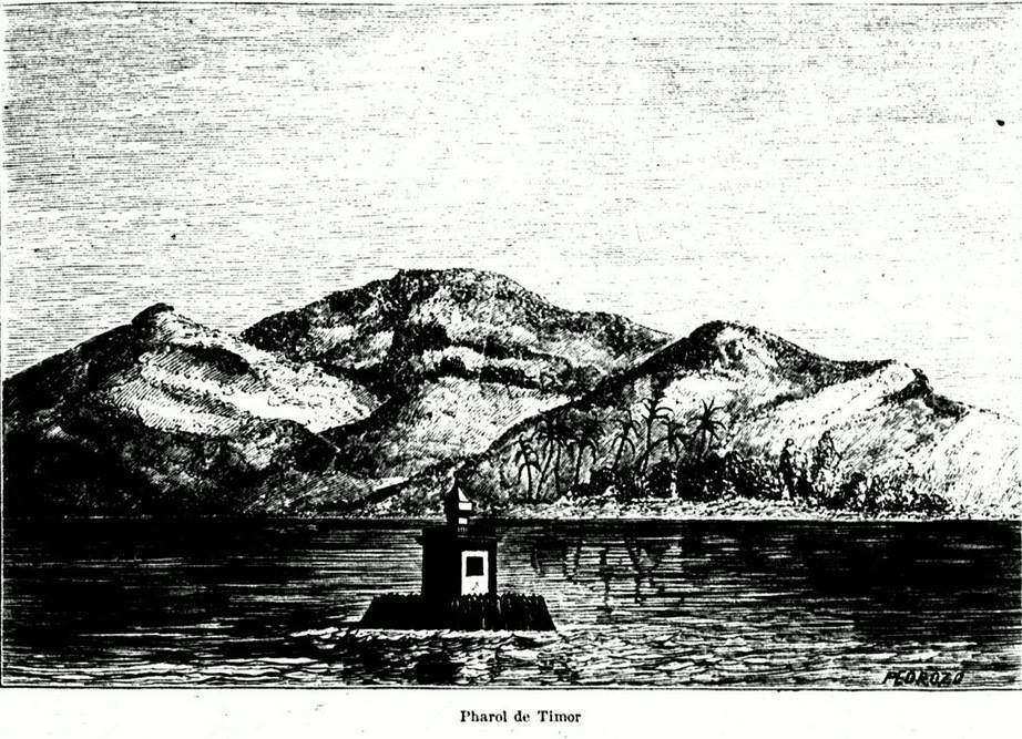 Farol de Timor